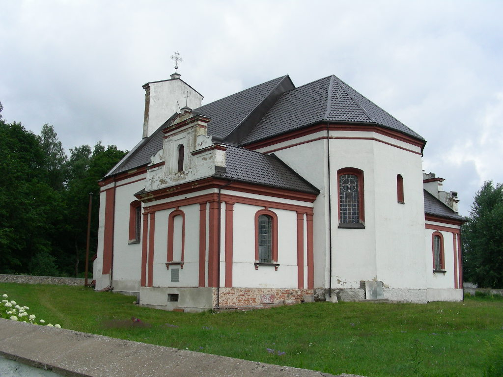 Беларуская (тарашкевіца): Касьцёл Сьв. Мікалая. в. Геранёны This is a photo of Belarusian heritage monument. Reference number: 412Г000293 ( WLM)